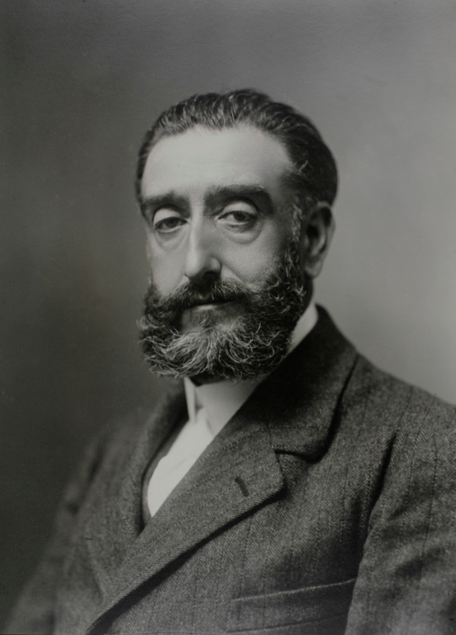 circa 1910